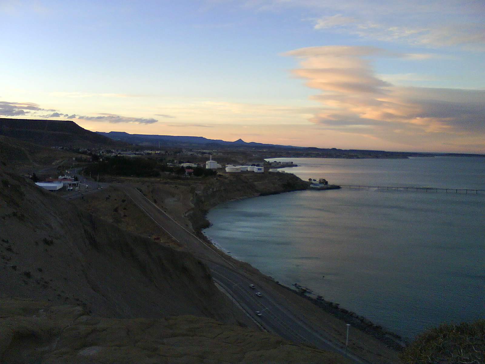 trecho que parte en 2 a la ciudad